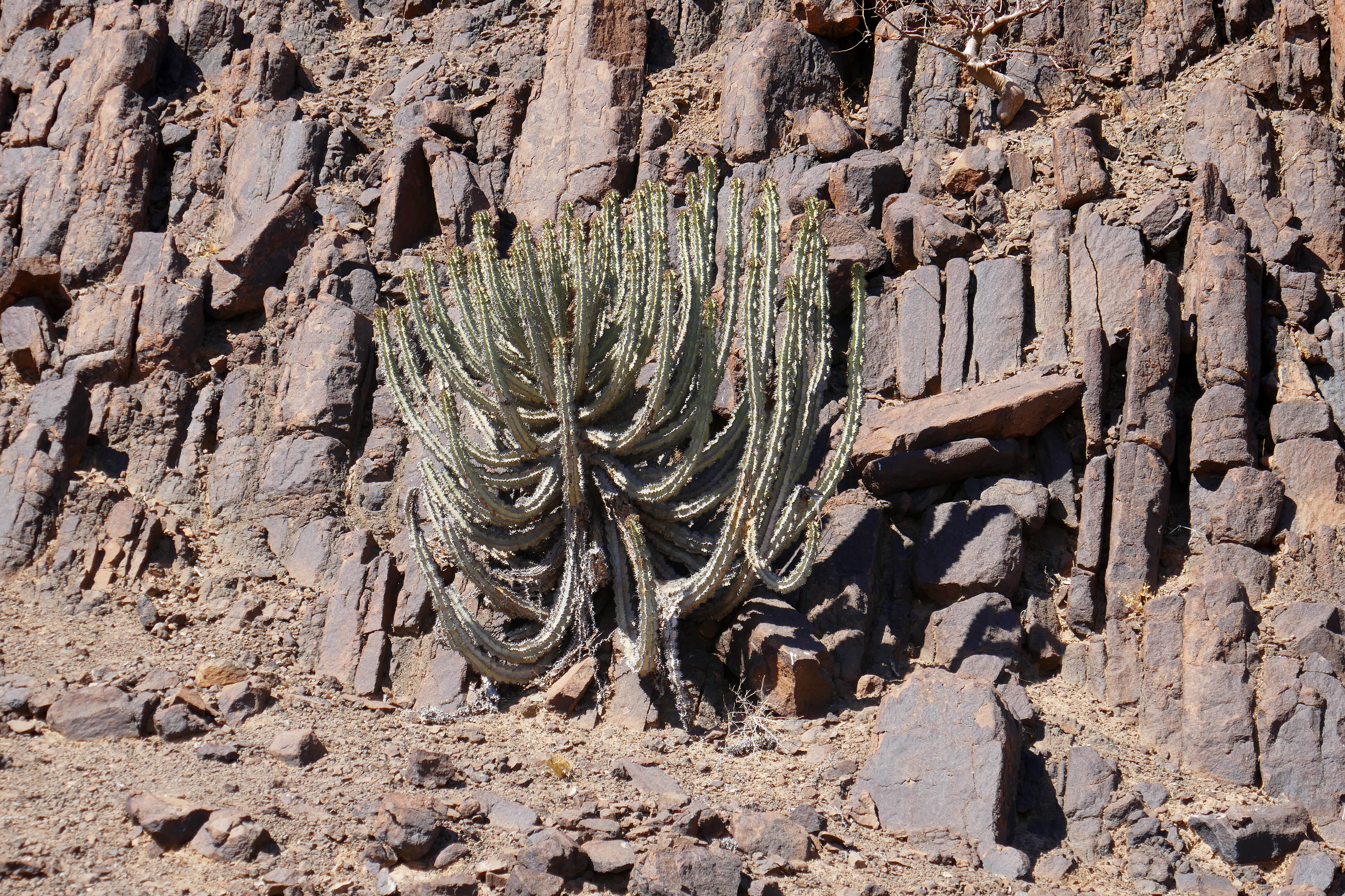 Euphorbia virosa (Damaraland, Namibia)